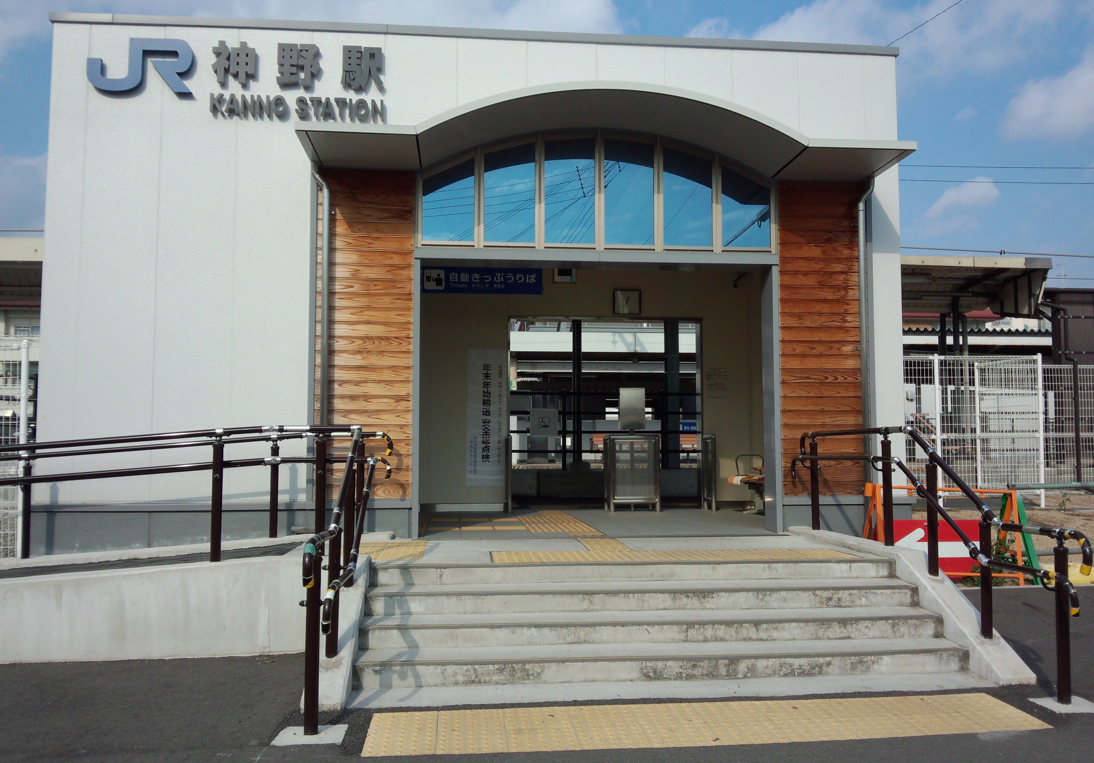 JR神野駅南口駅舎